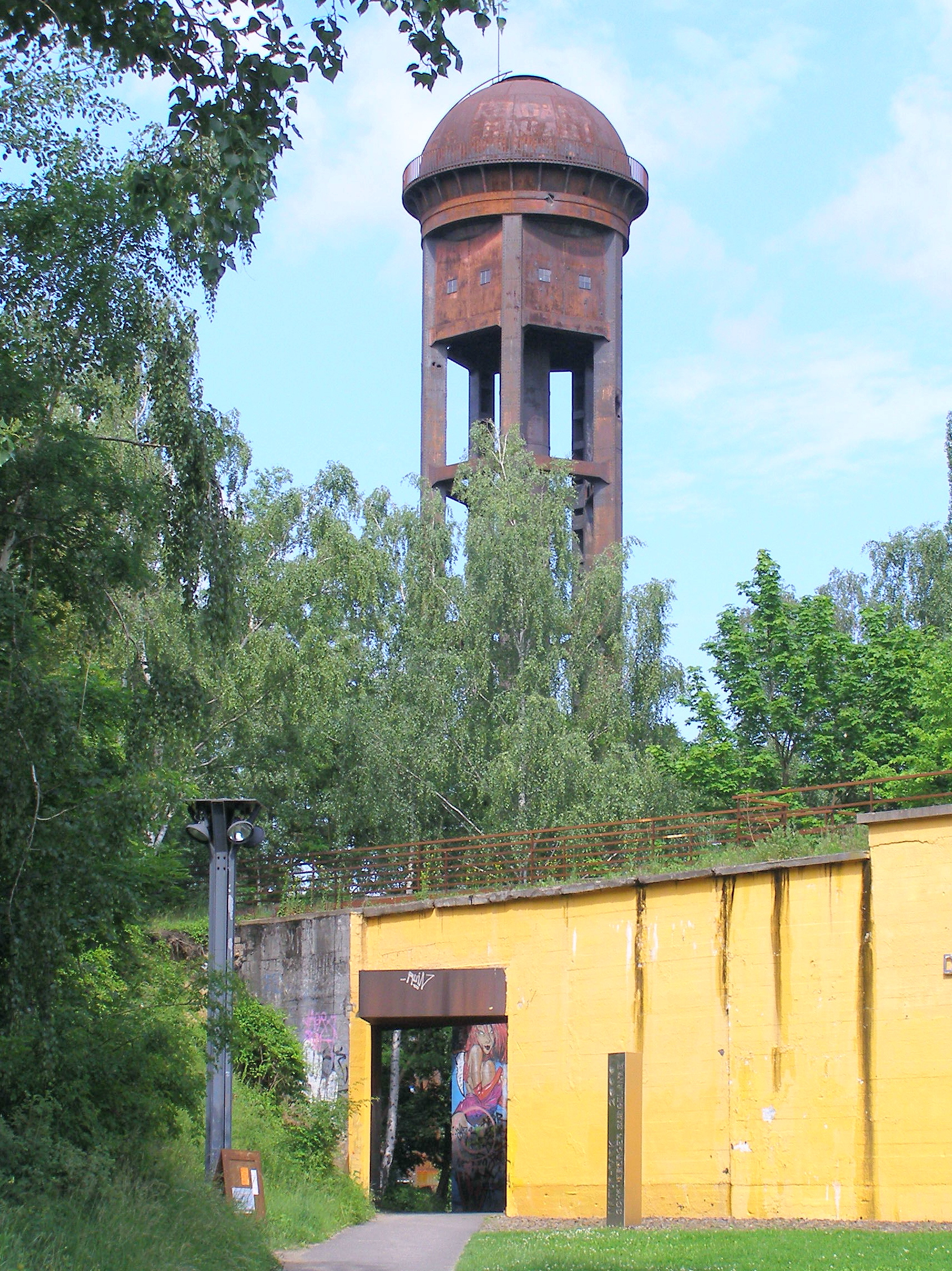 Natur-Park Schöneberger Südgelände, Berlin, Wasserturm